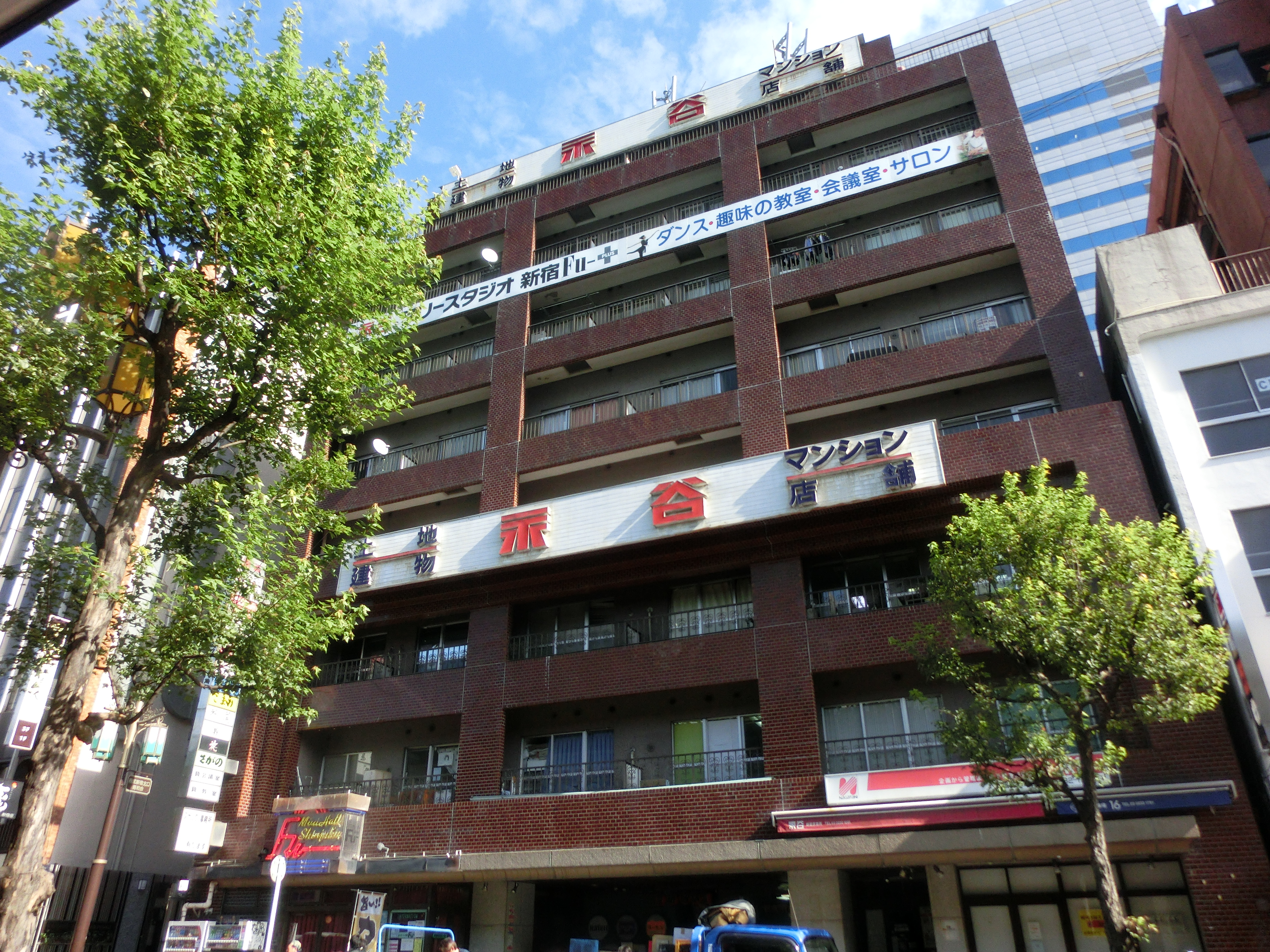 shinjuku nagatani